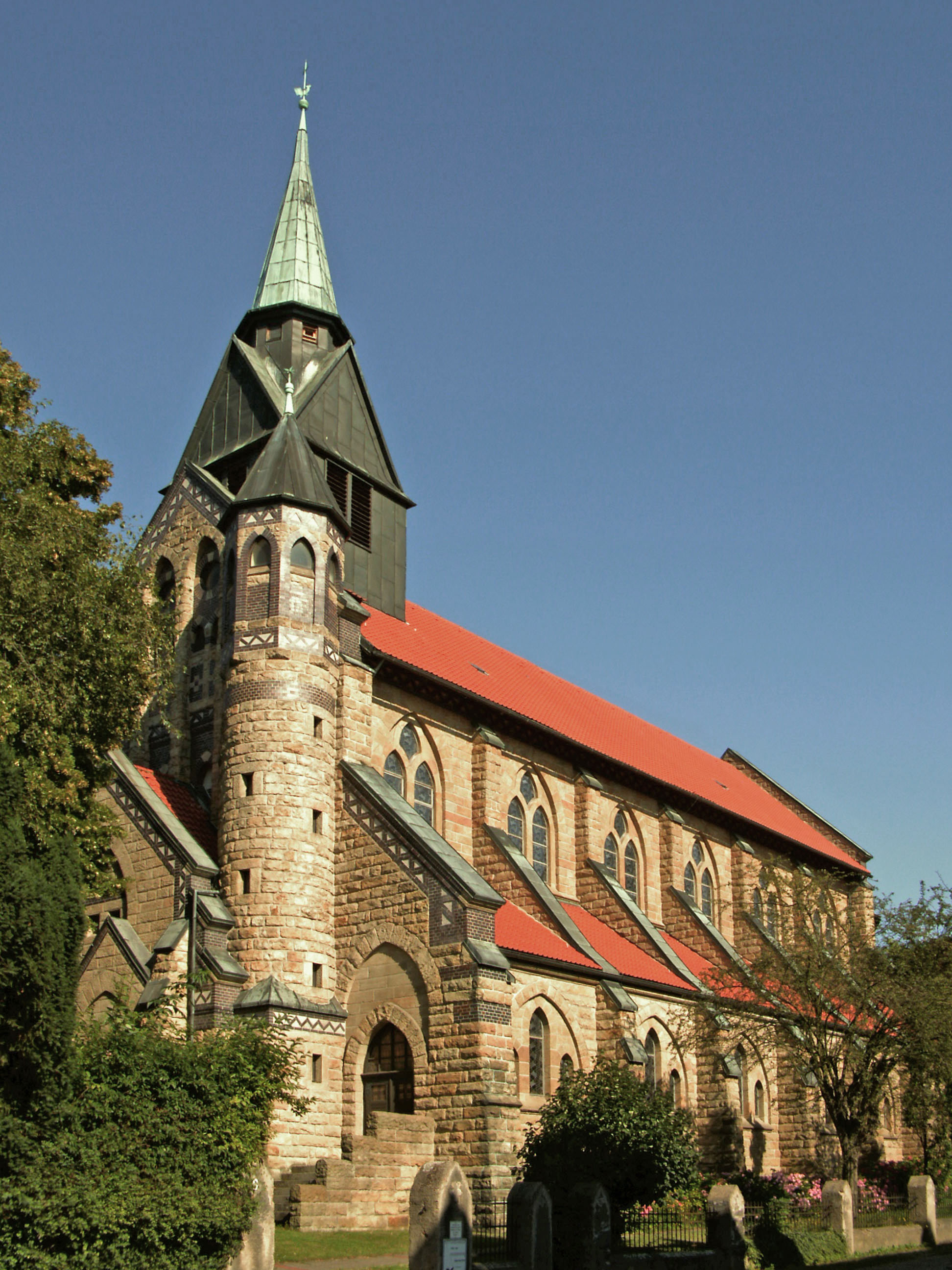 Katholische Kirche Maria Hilfe der Christen in Schöningen, Landkreis Helmstedt